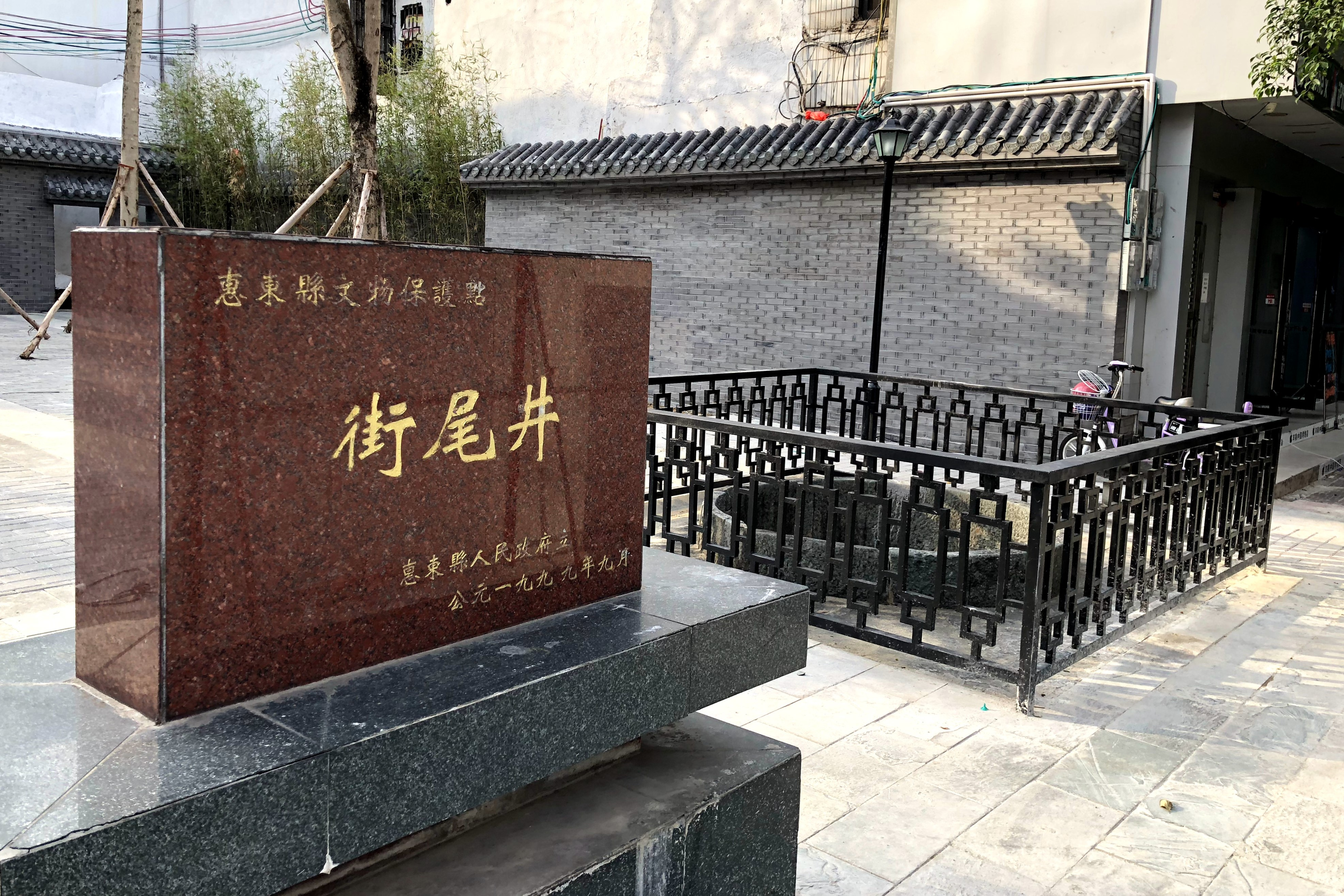 街尾井。保护牌和男井。